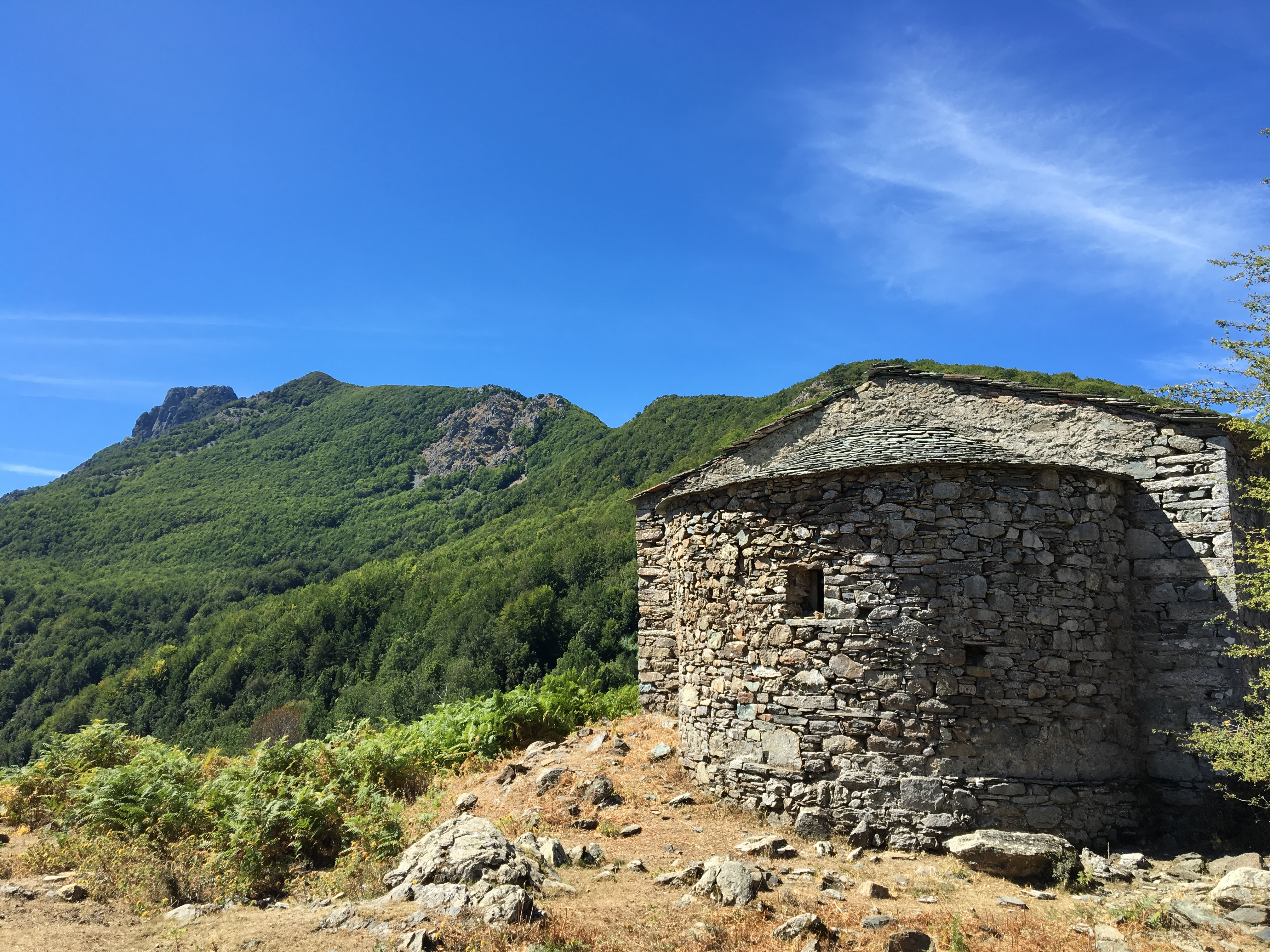 Ruines de l'ancienne chapelle romane de San Petru d'Accia, appelée aussi San Petrùculu.